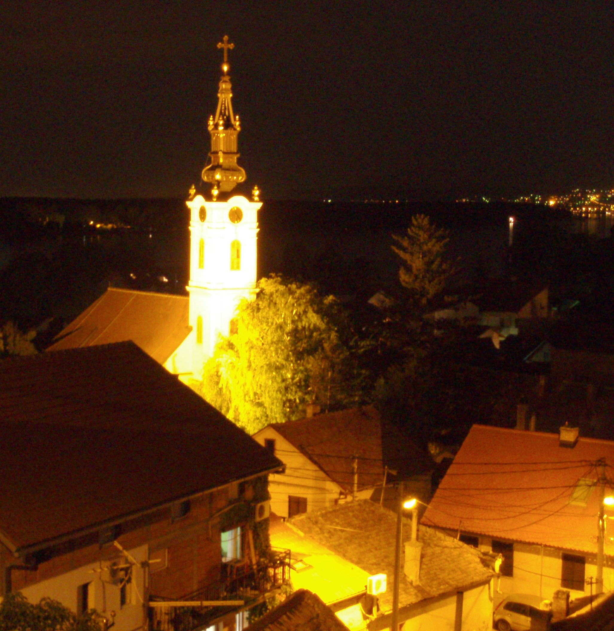 Николајевска црква у Земуну - Звоник изглед ноћу, аутор:Nicolo